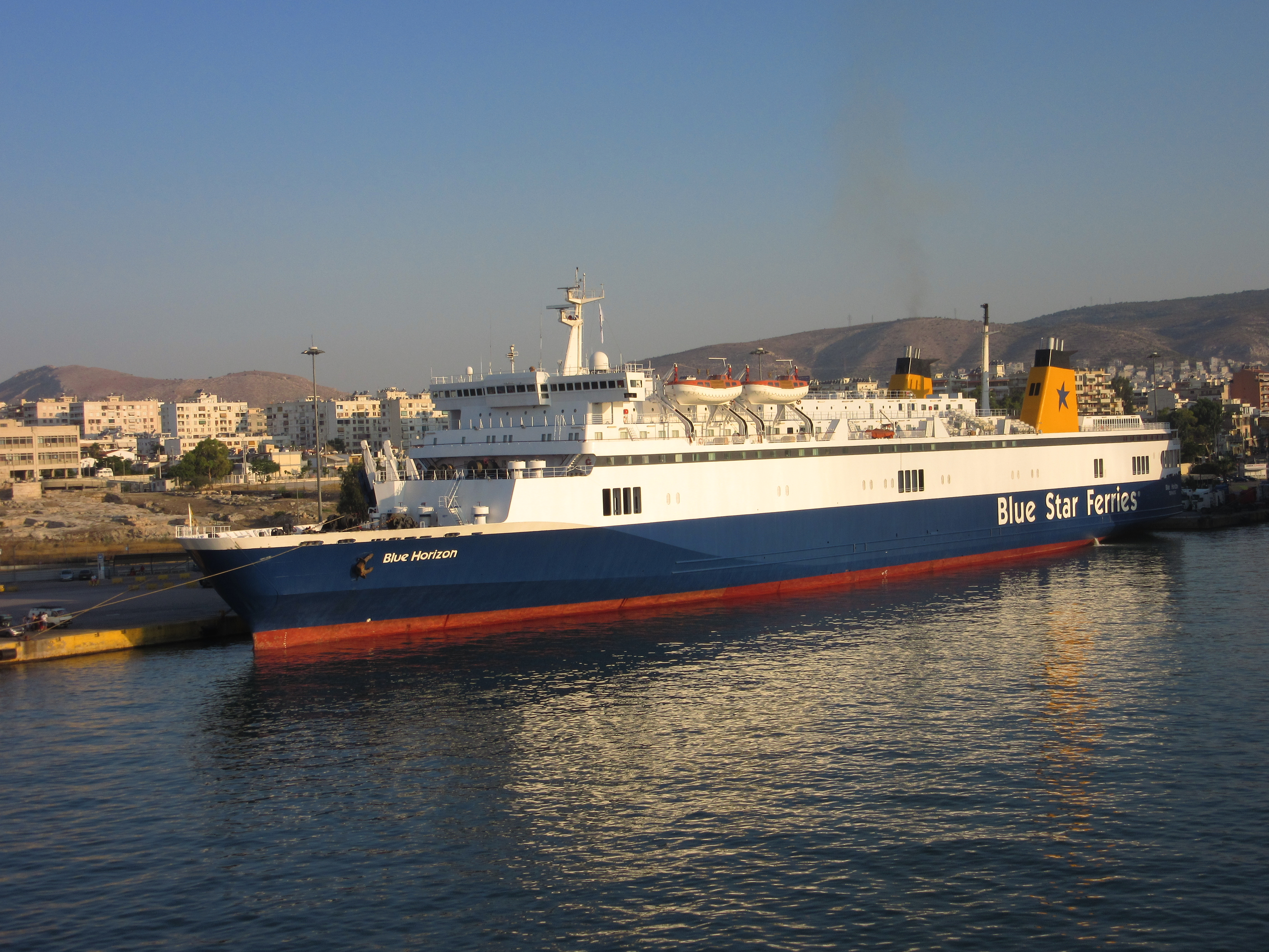 Blue Horizon in Piräus, Griechenland